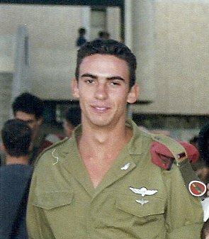 סג"מ עמנואל (מנו) לוי ז"ל מפק"צ בפלחה"ן צנחנים